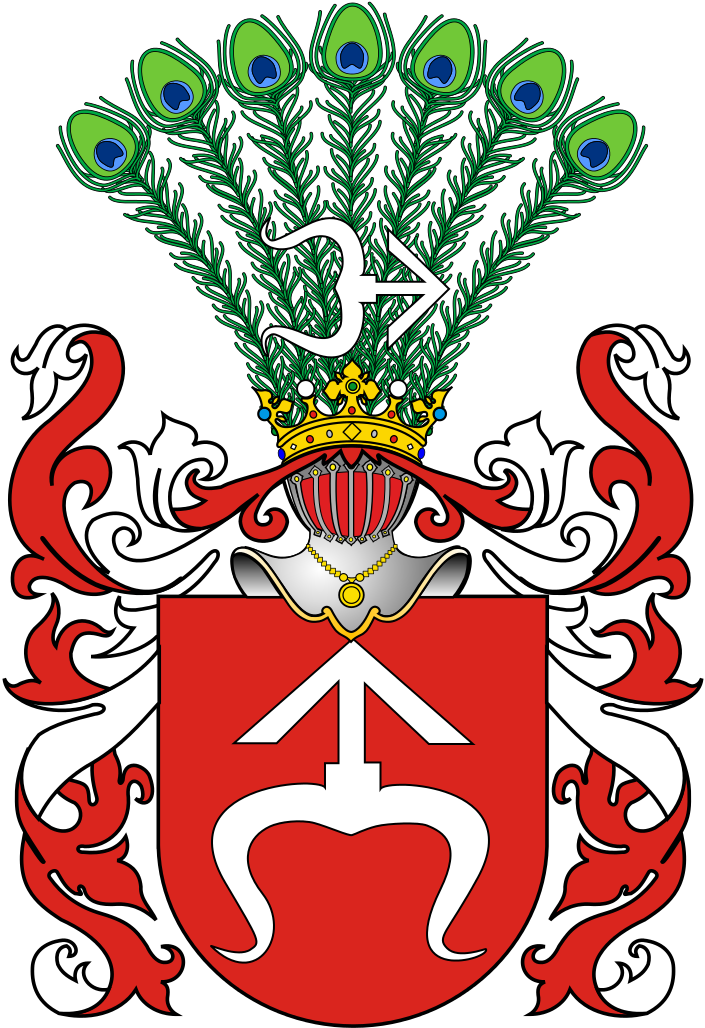 герб Одровнж